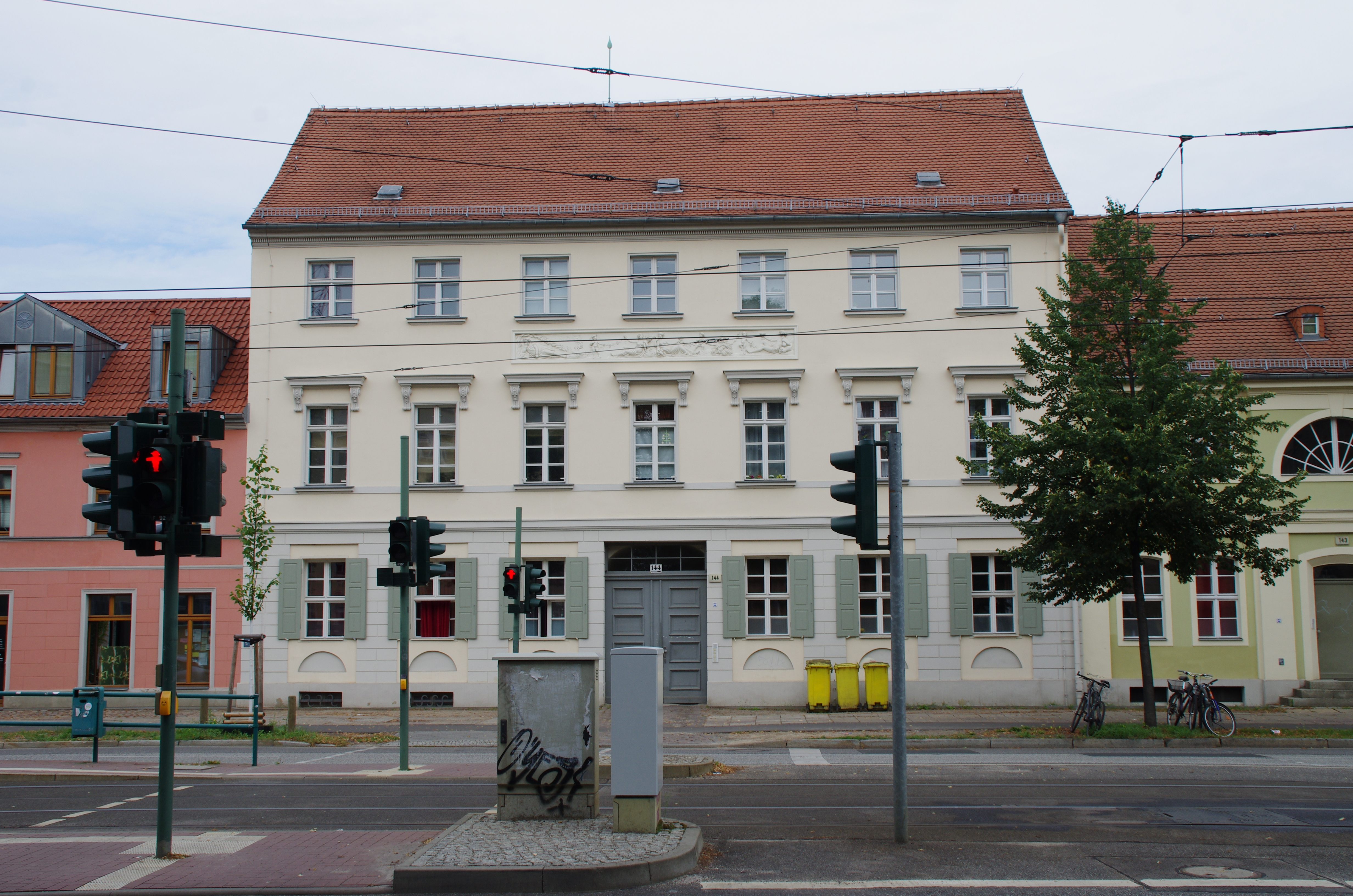 Potsdam in Brandenburg. Das Haus in der Straße Berliner Straße 144 steht unter Denkmalschutz.